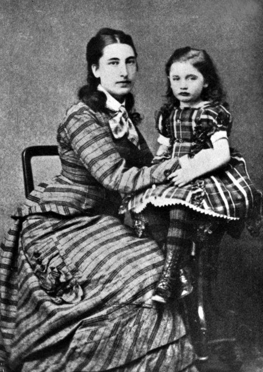 Victoria Benedictsson med dottern Hilma.